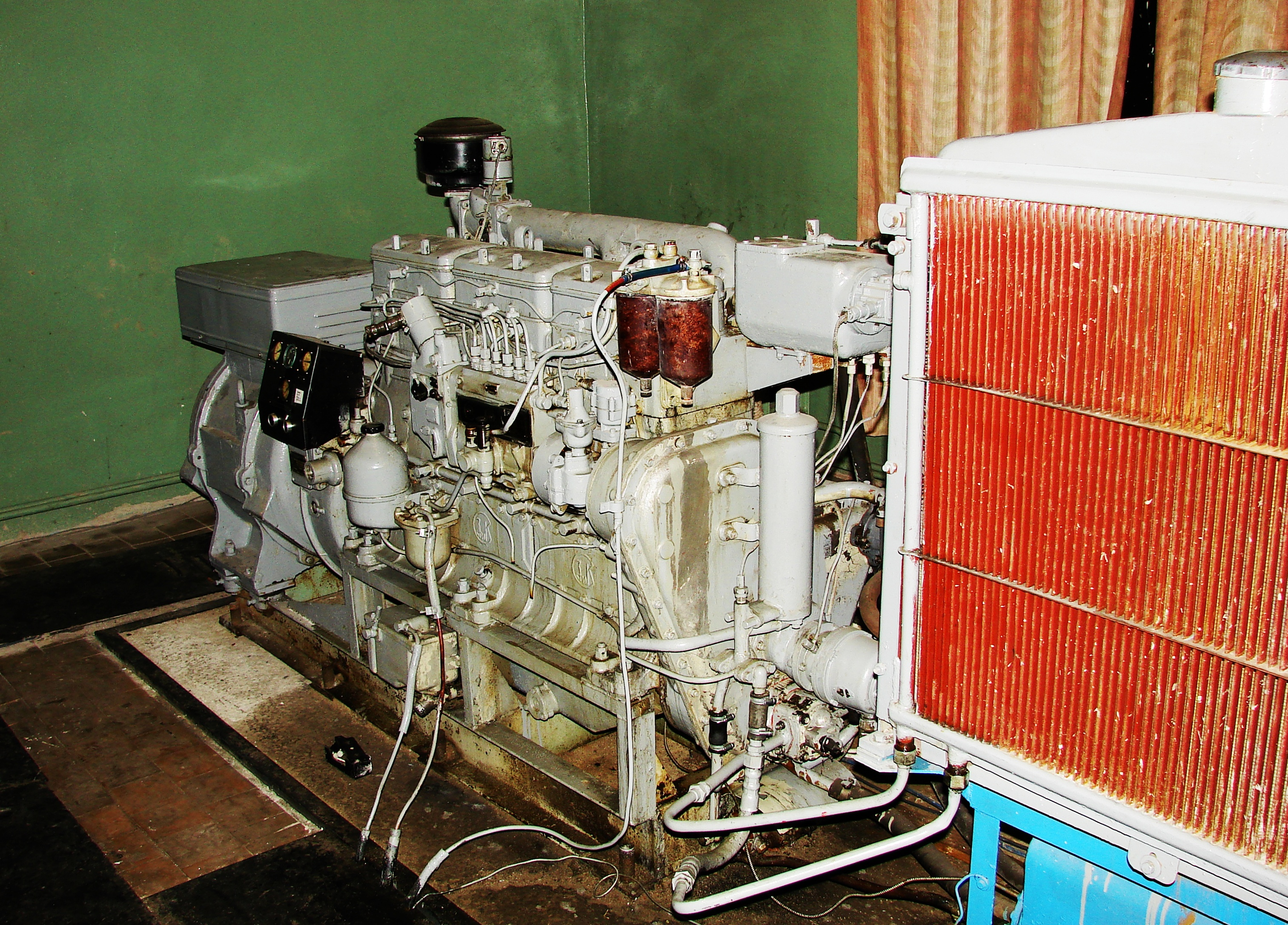 Дизельный генератор ДГА-3-48-М1 с дизелем К657М1